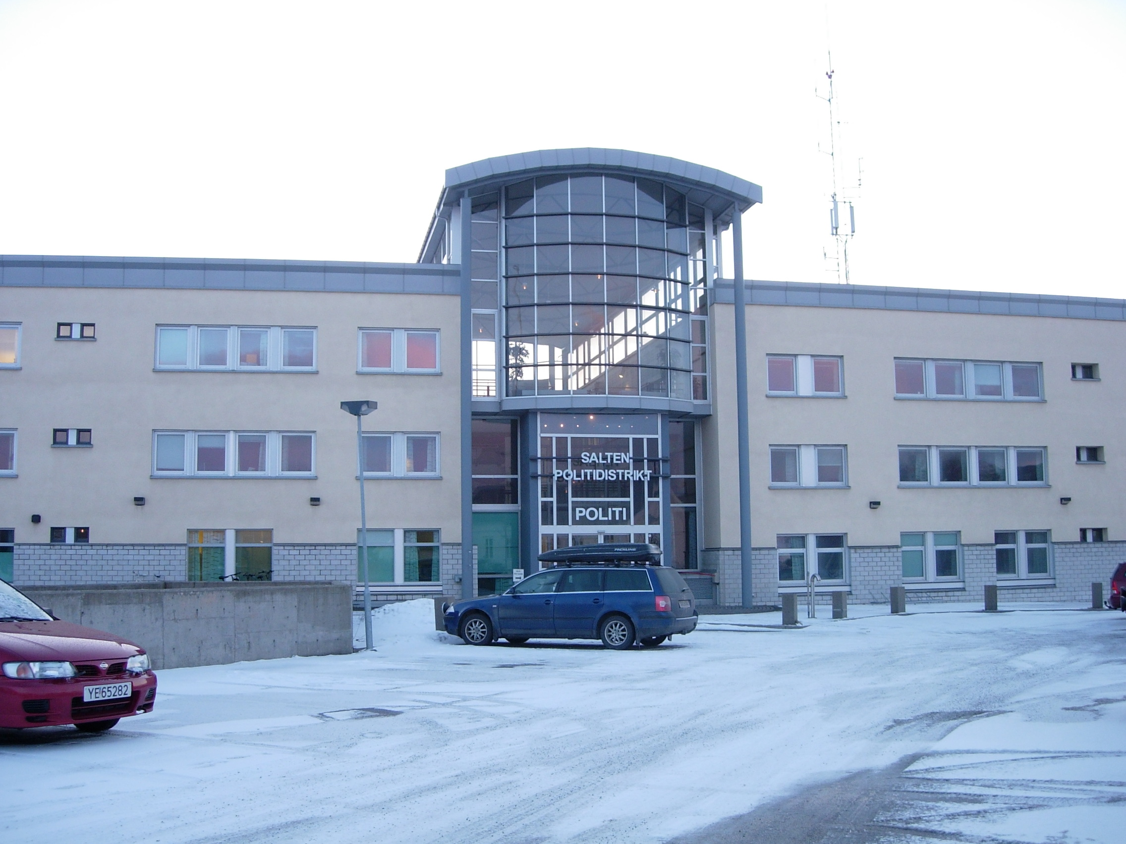 Salten police station in Bodø /Salten politidistrikt hovedkontor i Bodø